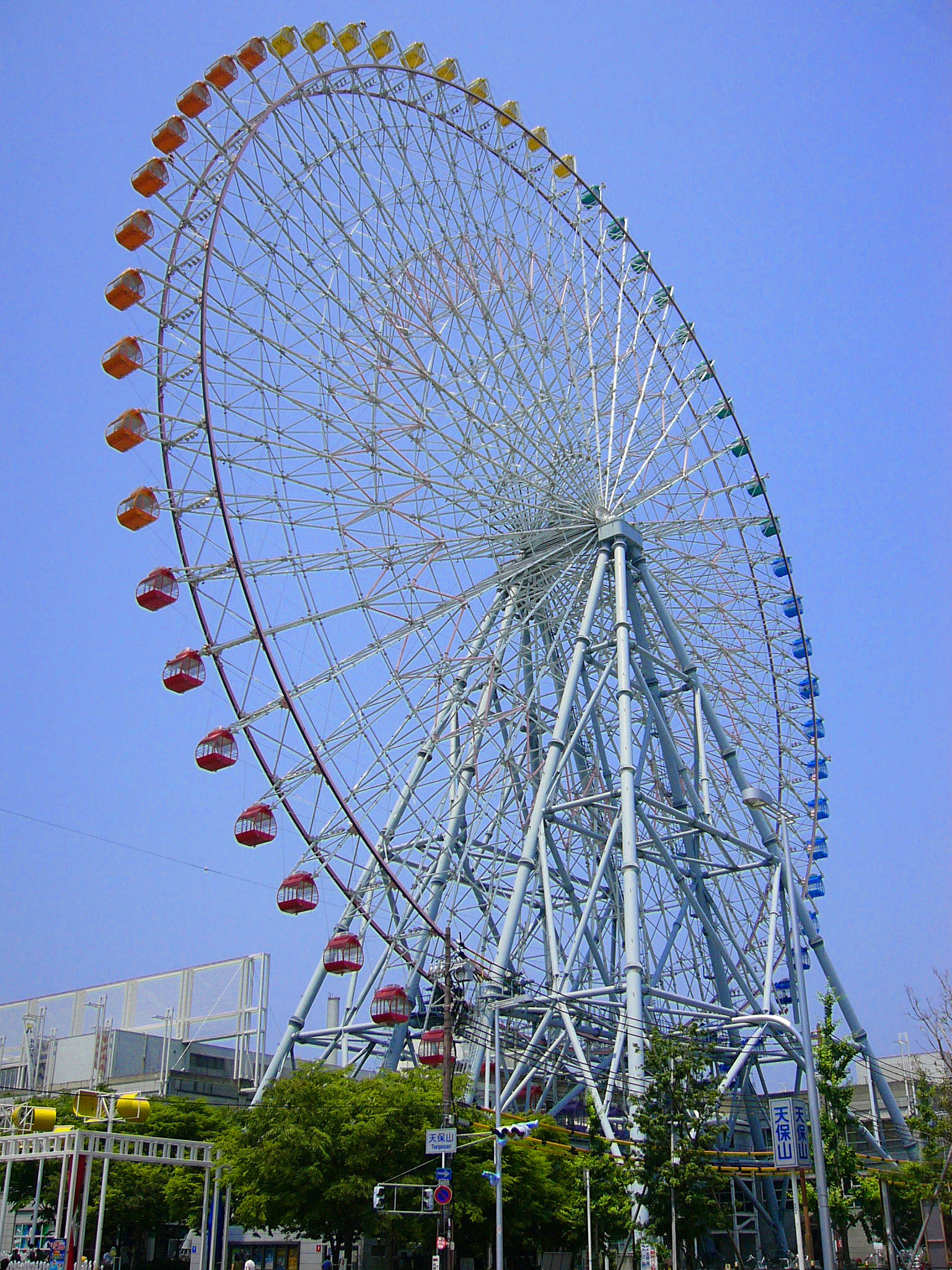 Tempozan Giant Wheel in Osaka, Japan